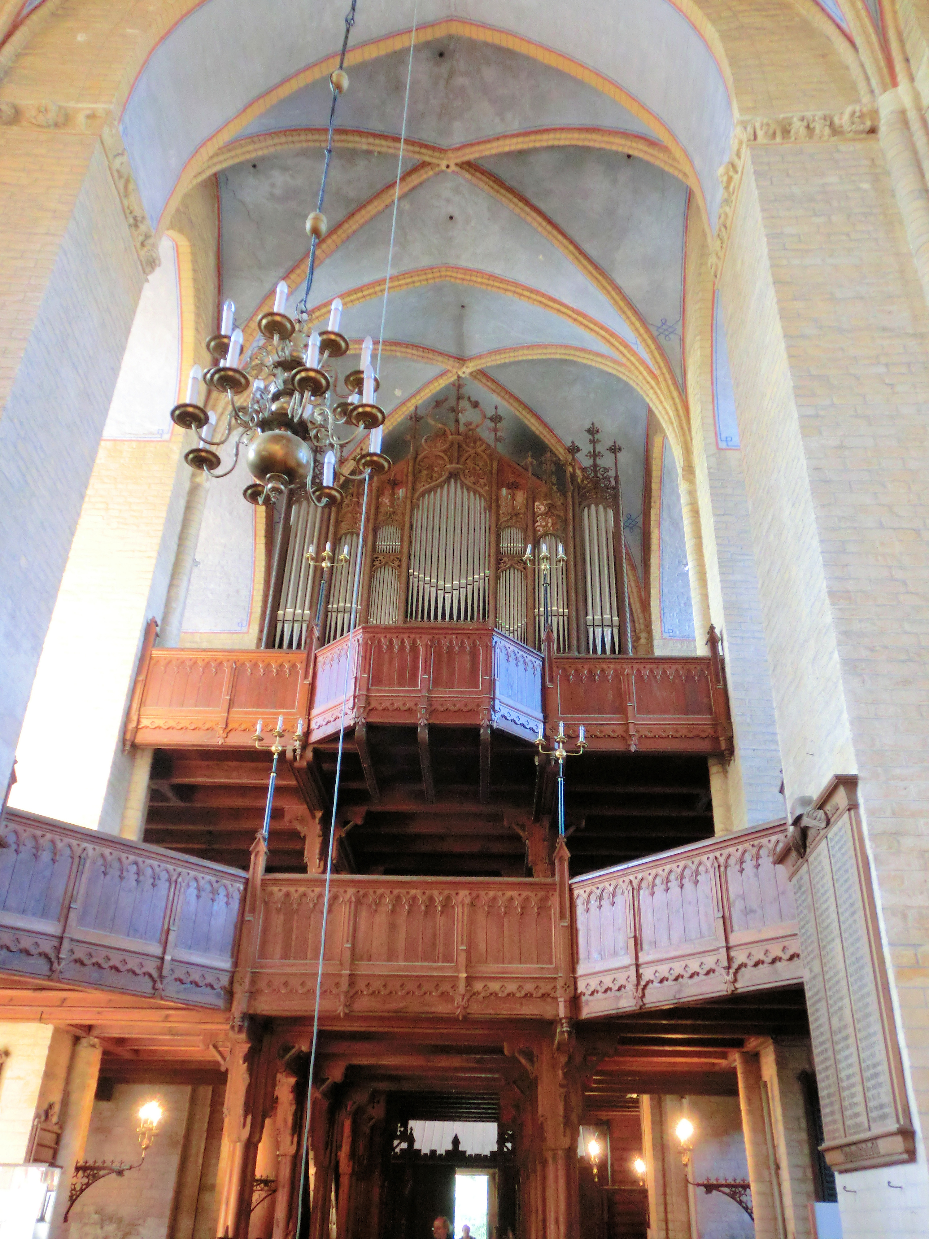 Bützow Stiftskirche Orgel